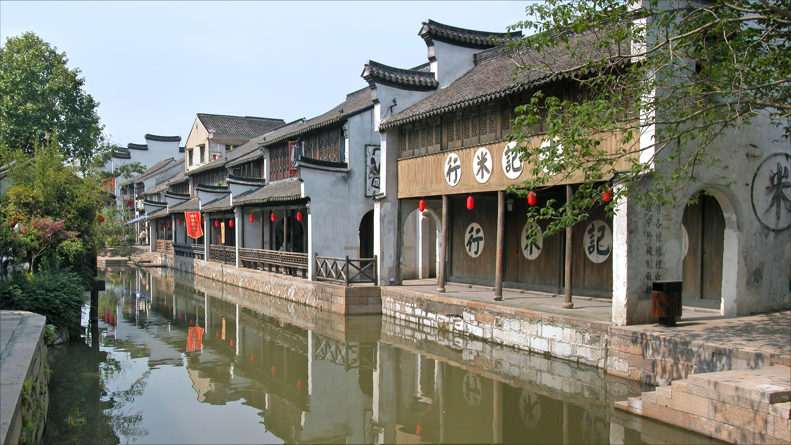 Nanxun est une ville, fondée au XIIIè siècle, et construite au coeur d'un réseau de canaux ce qui a facilité son développement économique à l'époque du commerce de la soie. De nombreuses maisons anciennes de commercants situées au bord des canaux ont été restaurées. La vieille ville de Nanxun à Huzhou été inscrite sur la Liste du patrimoine mondial de l’UNESCO en juin 2014 Site web de l'auteur sur Nanxun